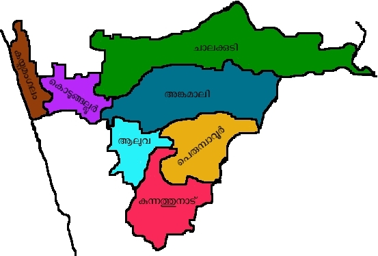 ചാലക്കുടി ലോക്സഭാ മണ്ഡലത്തിലെ നിയമസഭാ മണ്ഡലങ്ങൾ